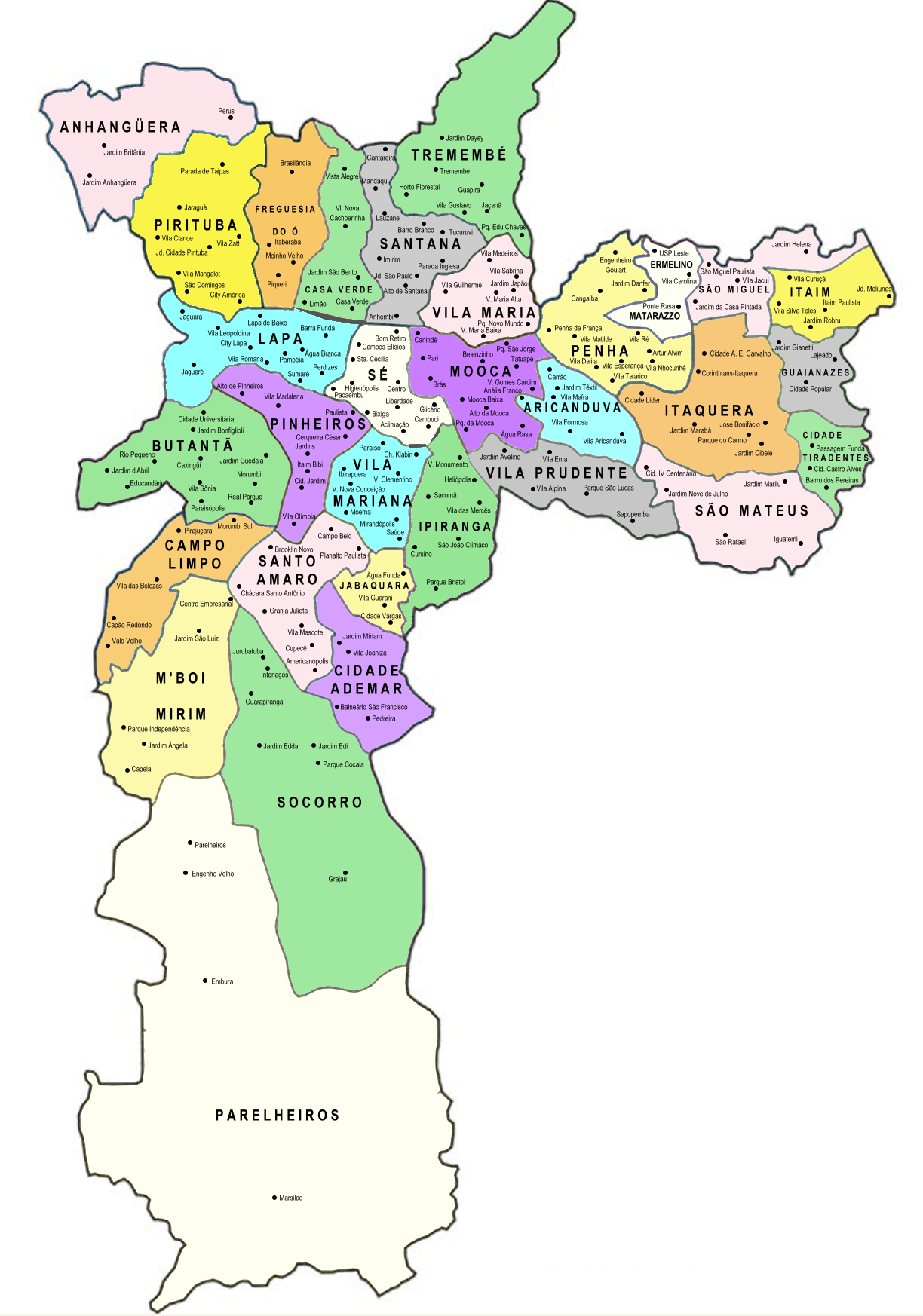 Mapa da cidade de São Paulo